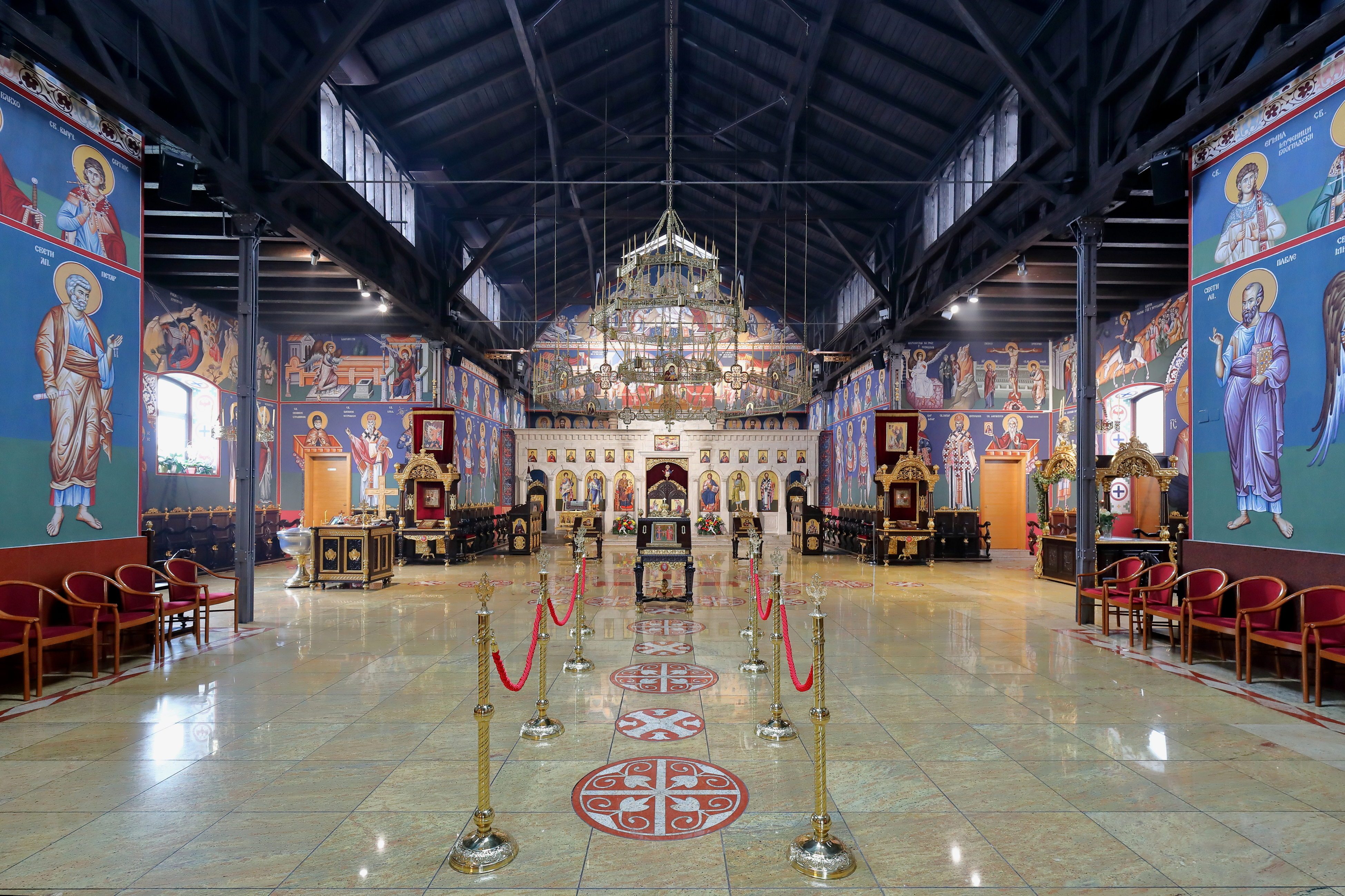 Innenansicht der serbisch-orthodoxen Auferstehungskirche an der Adresse Engerthstraße 158 im 2. Wiener Gemeindebezirk Leopoldstadt. Die Auferstehungskirche wurde in einer aufgelassenen Straßenbahngarage errichtet und am 26. Oktober 2002 geweiht. Ab 2006 fand ein Umbau statt, der mit der Neueinweihung der Kirche am 30. September 2007 abgeschlossen wurde. Bei dem Umbau wurden unter anderem die zwei Kirchtürme errichtet.